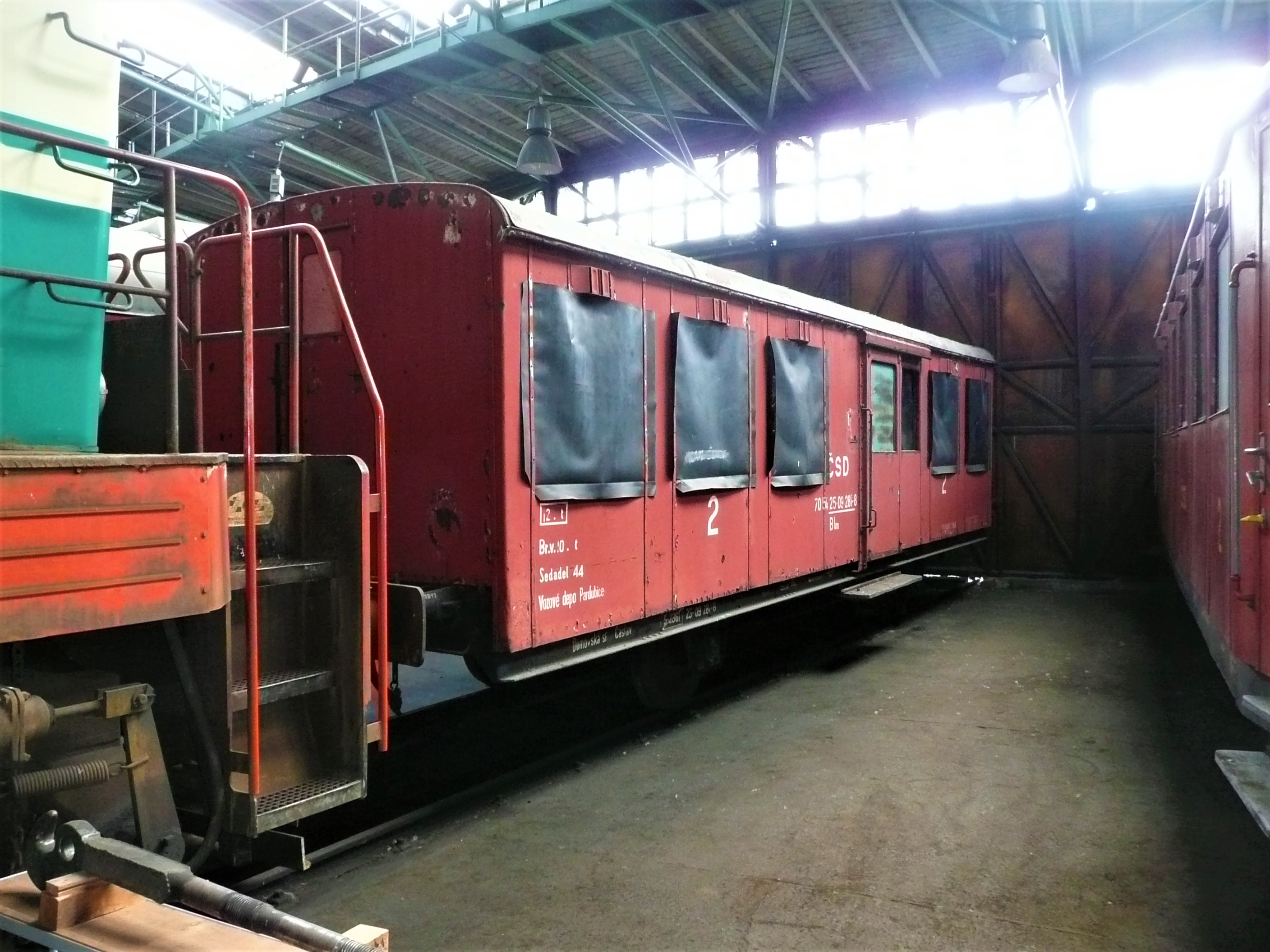 Zweiachsiger Beiwagen Clm4 für zweiachsige Triebwagen aus der Zeit vor 1945 im NTM Depot Chomutov